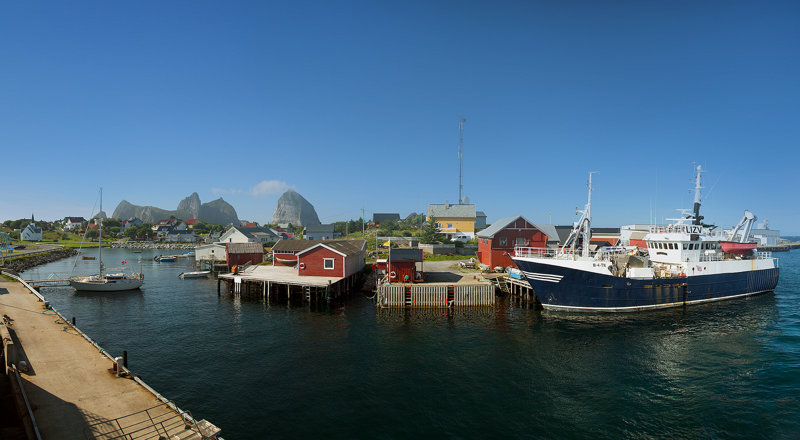 Træna havn i nordland, Norge